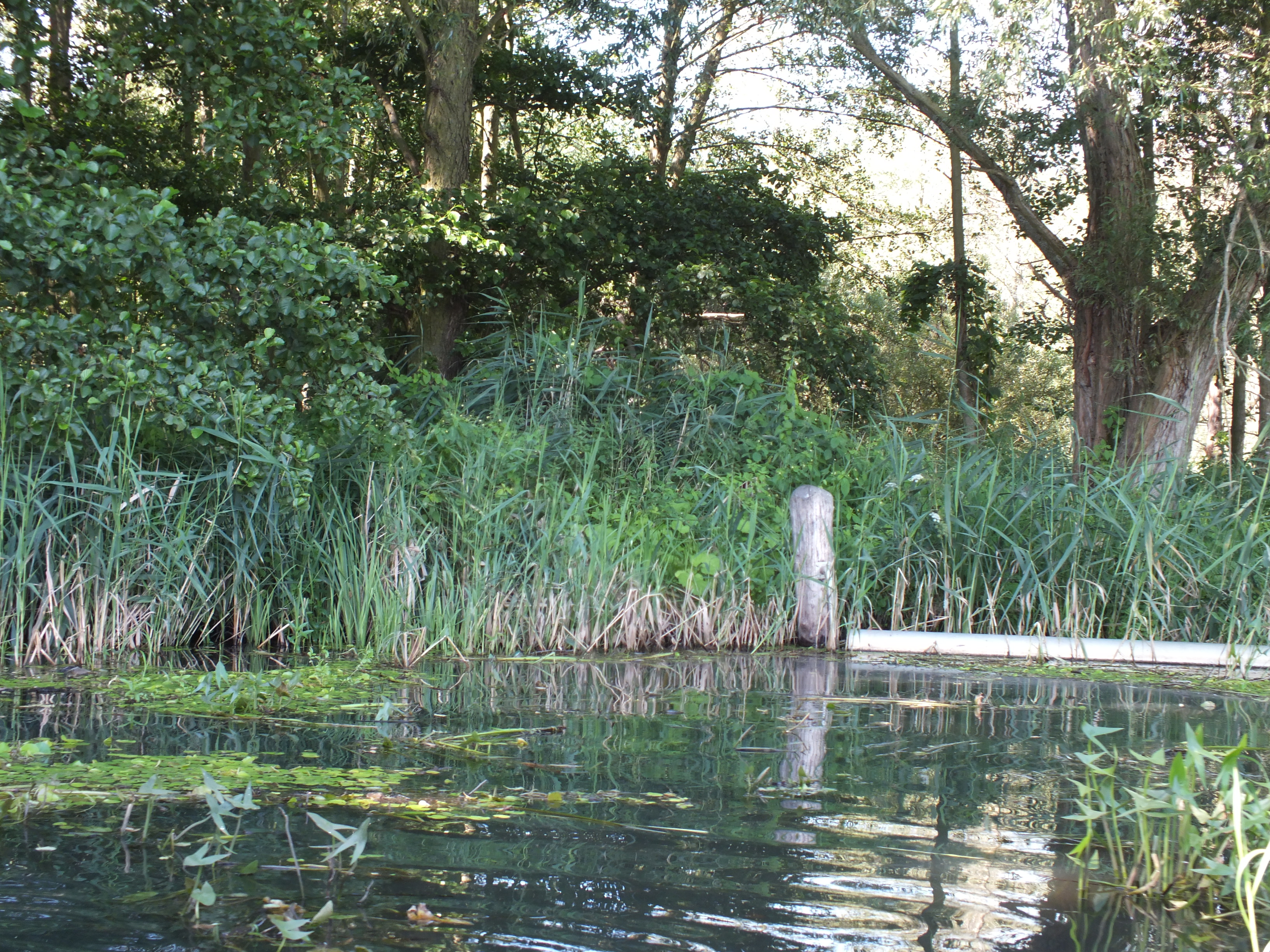 Impression aus dem Schutzwald „Schützenhaus“, Alt Zauche-Wußwerk, Brandenburg